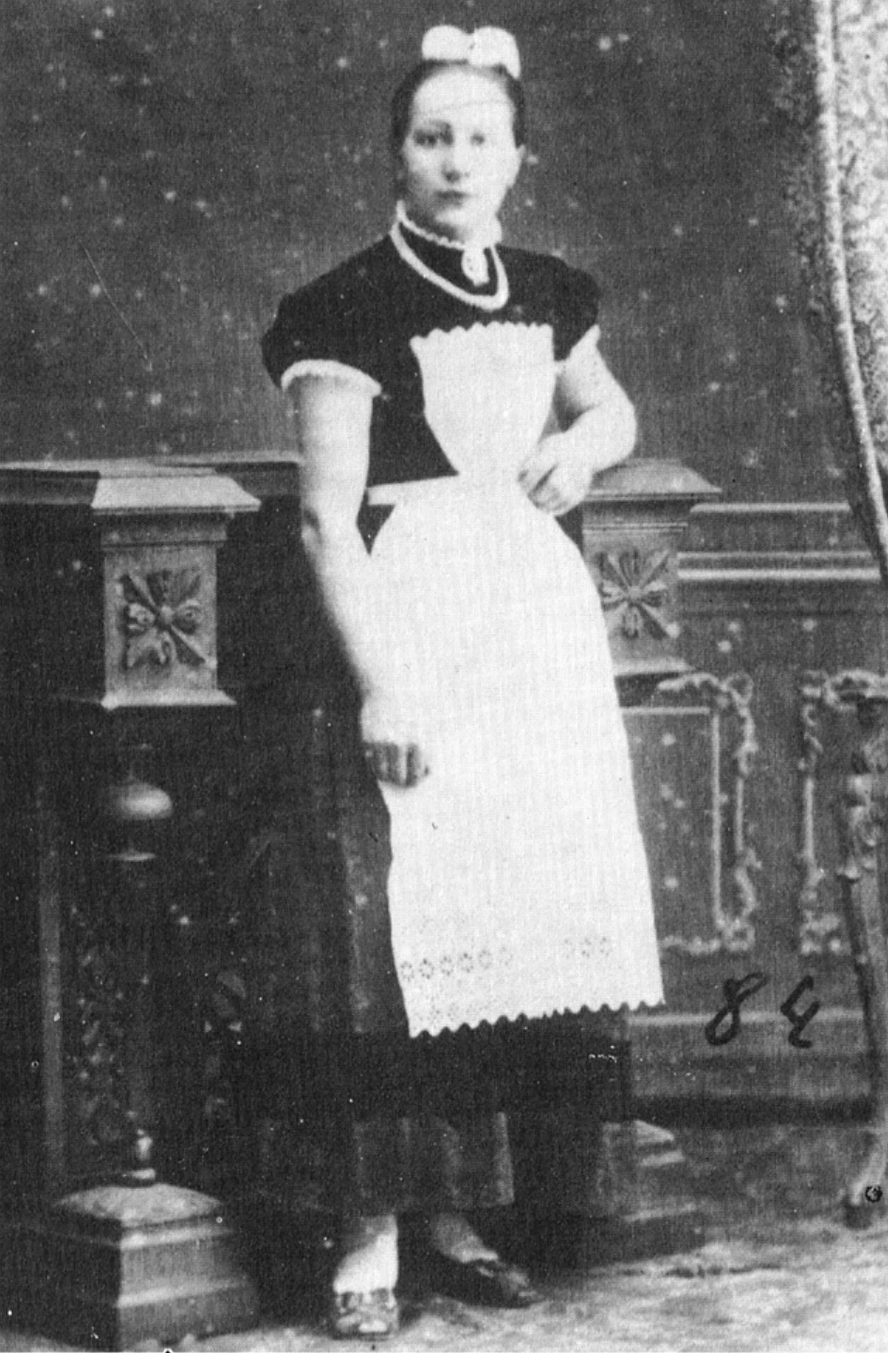 Meta Kahlke (1870-1886), Hausmädchen von Michael Lienau auf Schloss Düneck. Beging am 23. Juni 1886 mit 15 Jahren aus Verzweiflung Selbstmord. Sie wurde später die Hauptfigur in Carl Bulckes Roman "Silkes Liebe", der 1901 erschien. Insgesamt wurde der Roman sechs mal aufgelegt und in ganz Deutschland bekannt und berühmt.